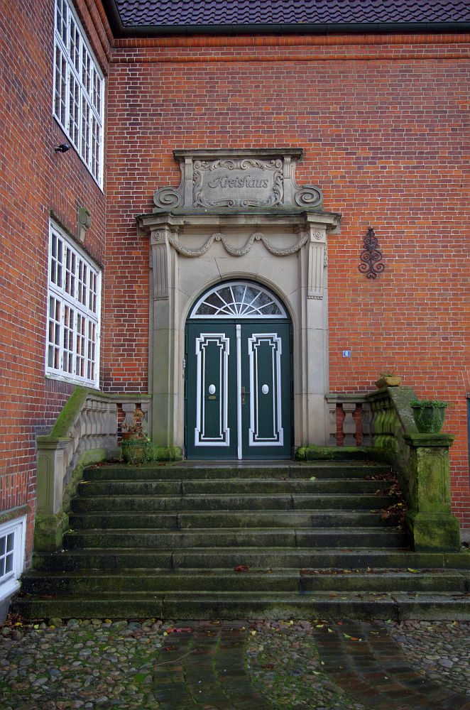 "Altes Kreishaus" in Bordesholm, Eingang